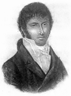 Litografia di Vincenzo Cuoco